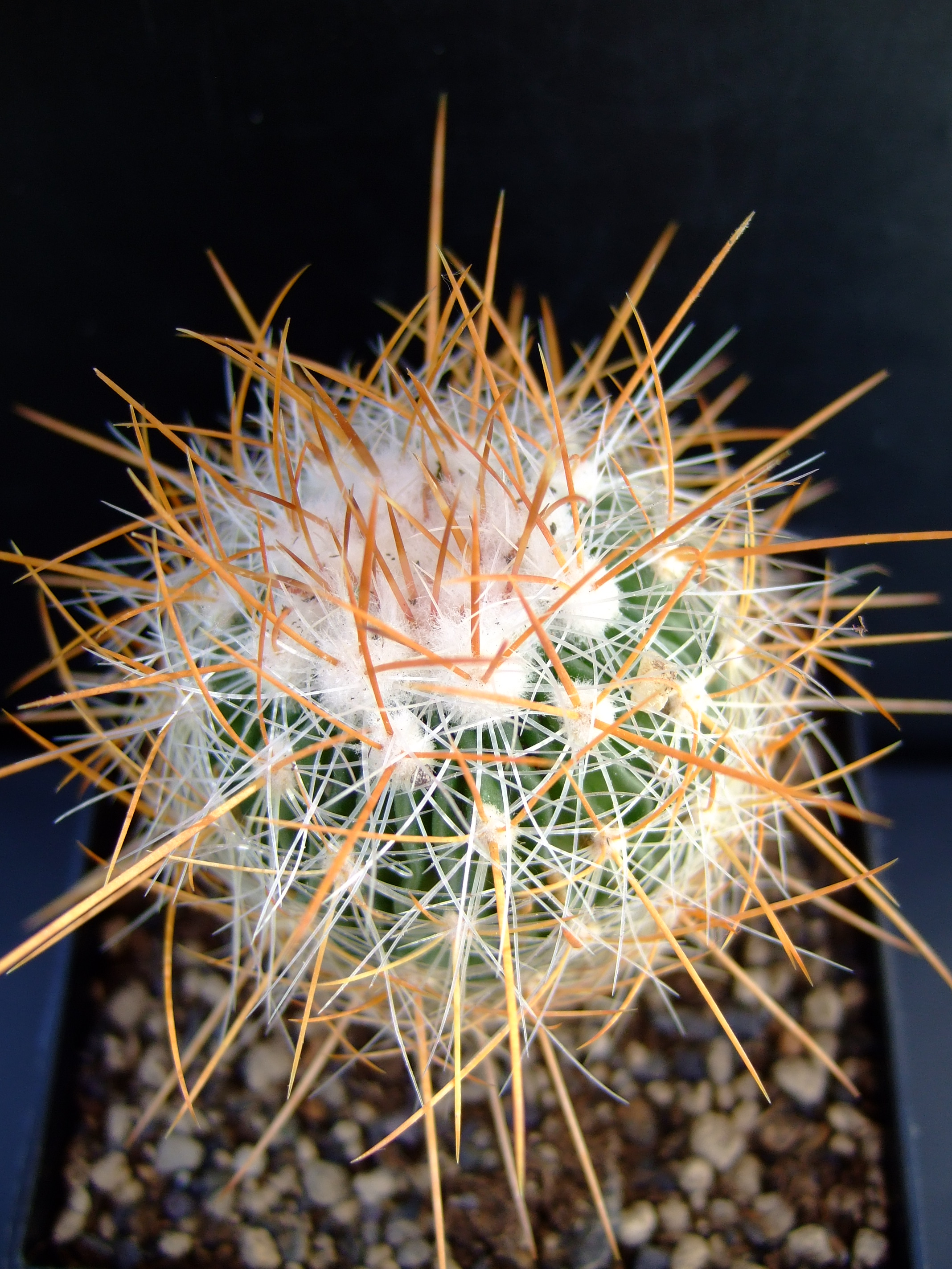 Blühfähige Jungpflanze von Stenocactus vaupelianus (Syn. Echinofossulocactus albatus)